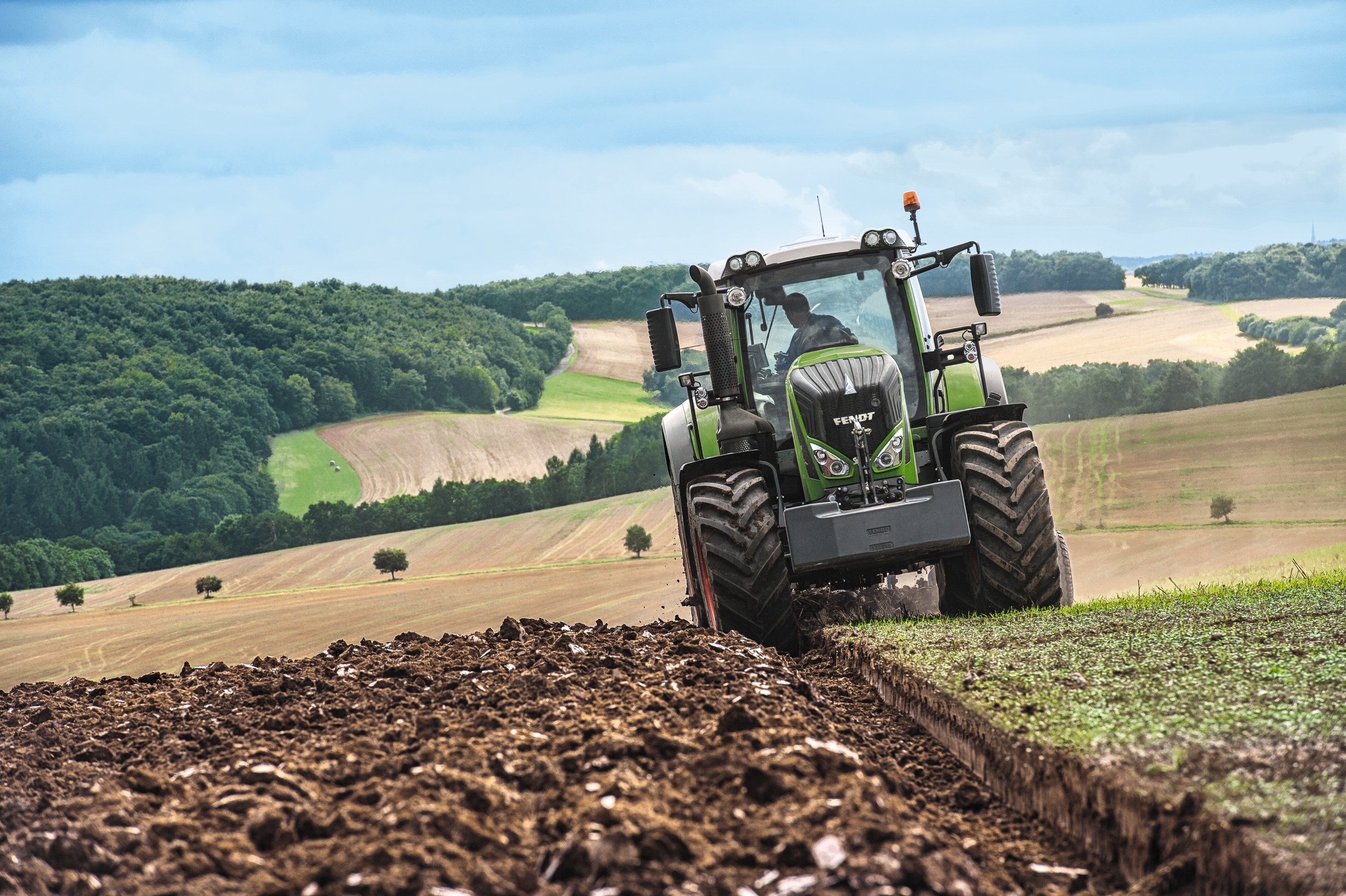 Fendt 800 Vario beim pflügen